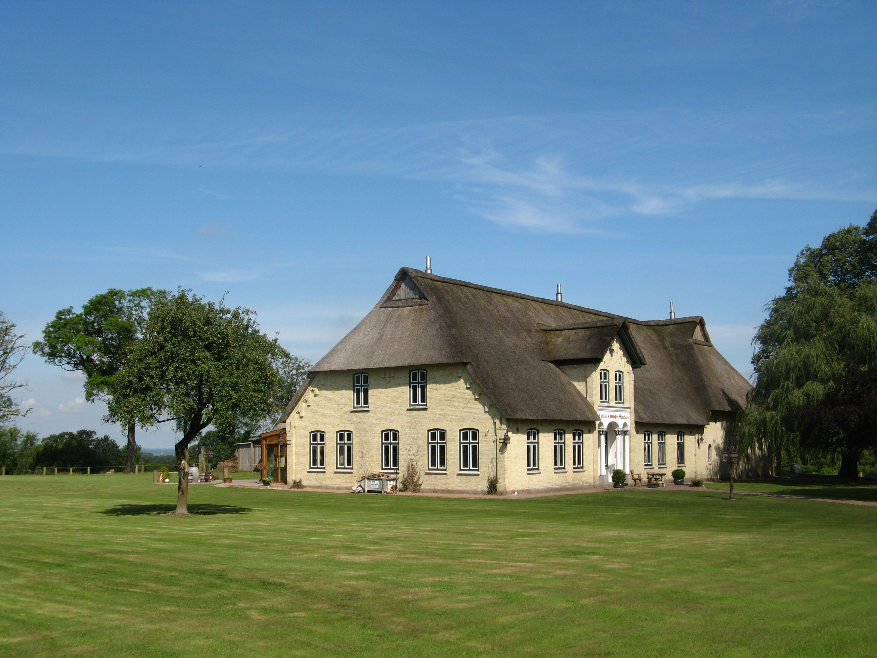 House in Schrum